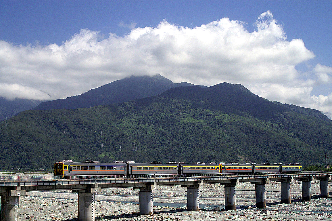 中文（台灣）: 臺灣鐵路管理局花東線木瓜溪橋，背景為初英山。